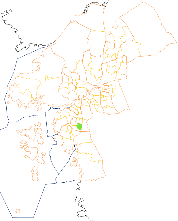 Karta som visar primärområdes belägenhet i Göteborg